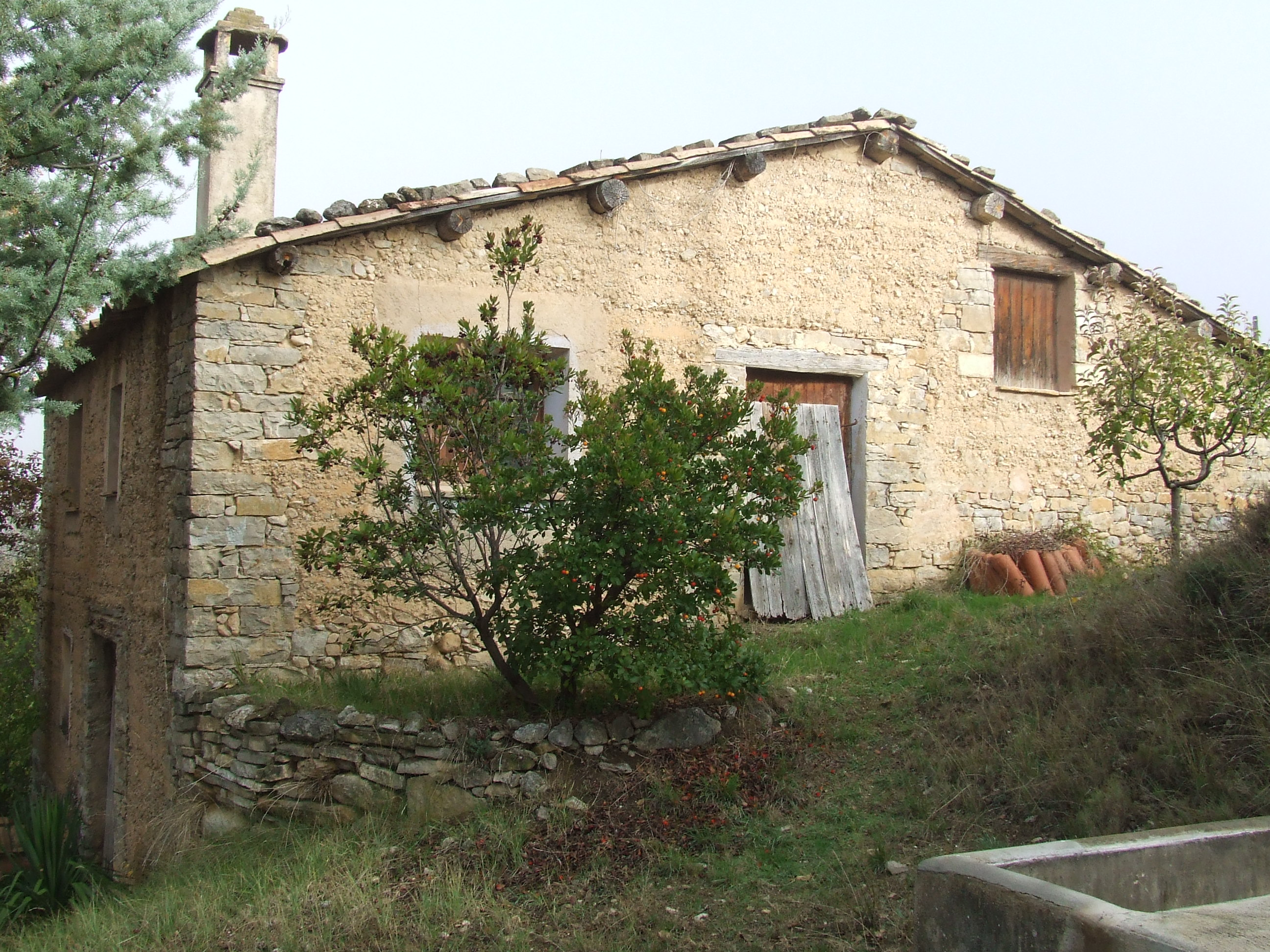 Cal Miquela, casa vella (Abella de la Conca, Pallars Jussà)